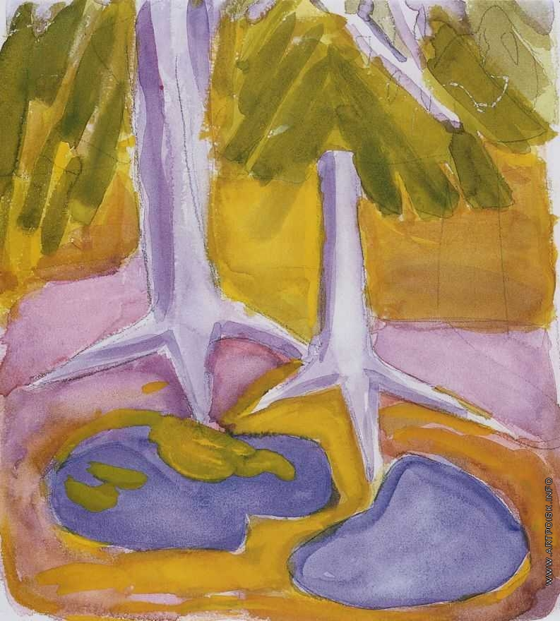 Е. Гуро. Корни деревьев. Бумага, гуашь, 22 х 20,5